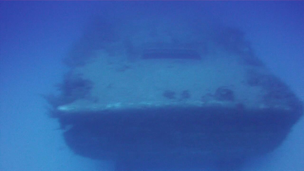 P29 : la poupe